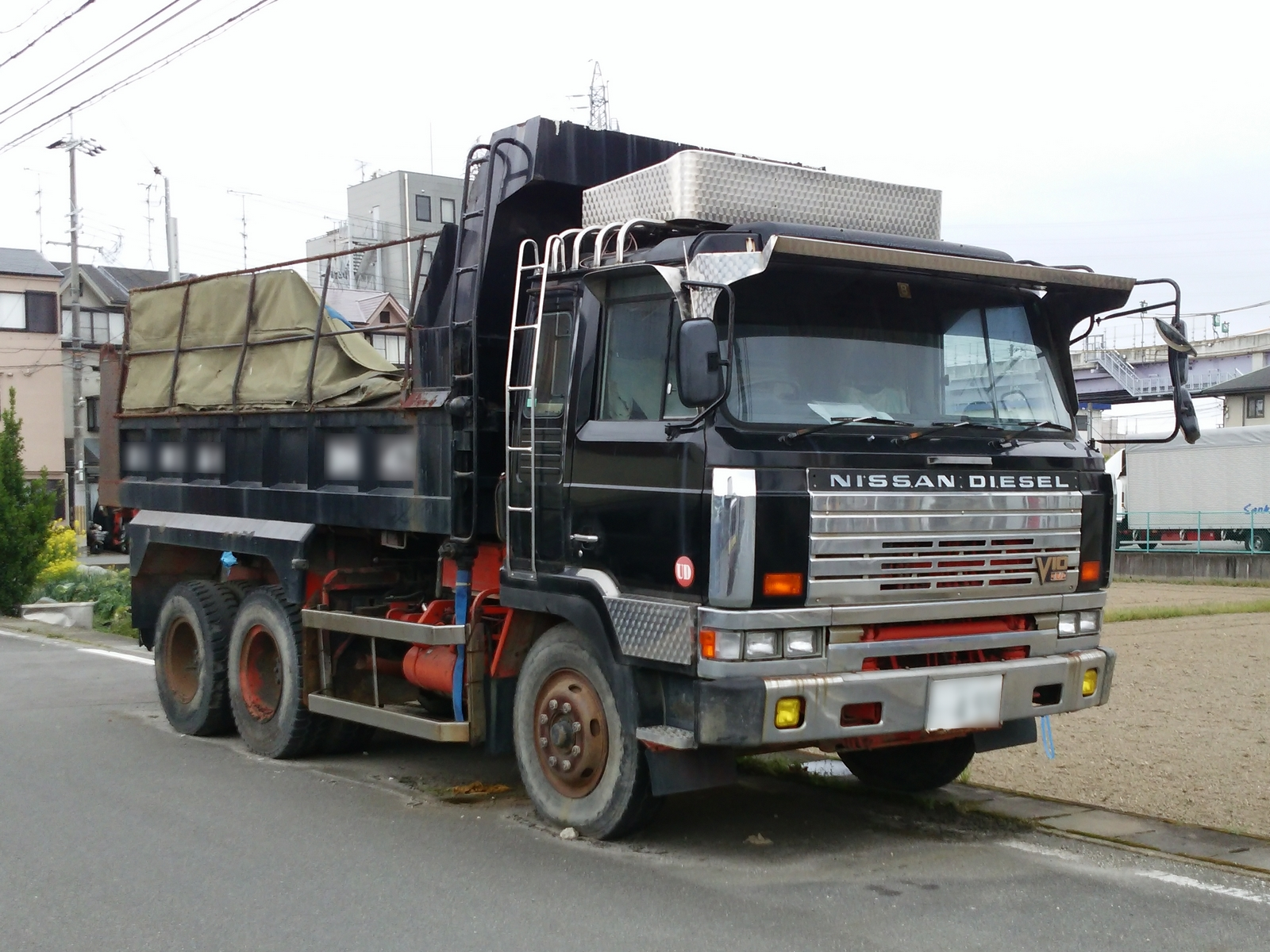 レゾナ ダンプ（後期型）